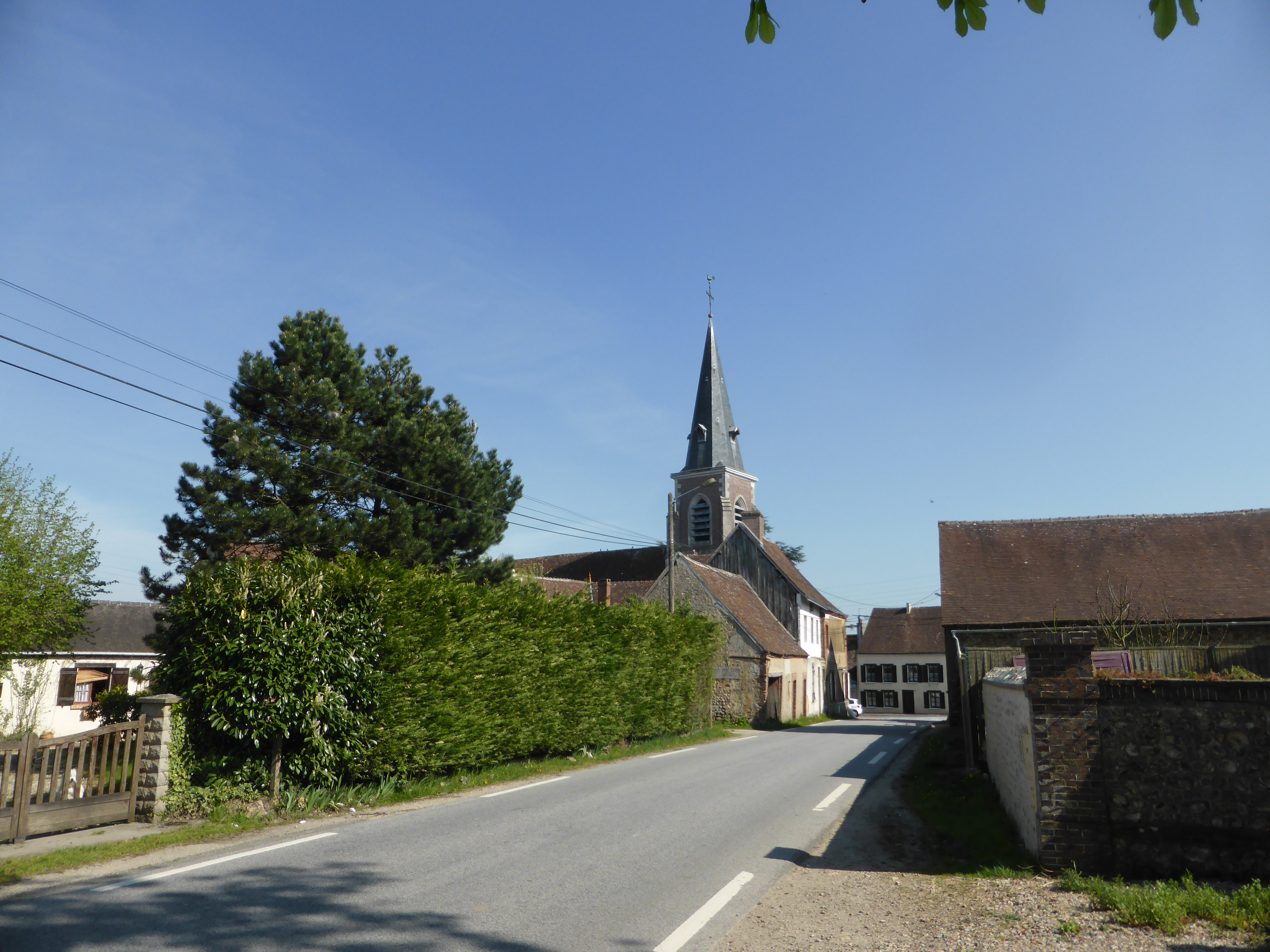 Champrond-en-Gâtine et son église Saint-Sauveur, en Eure-et-Loir.